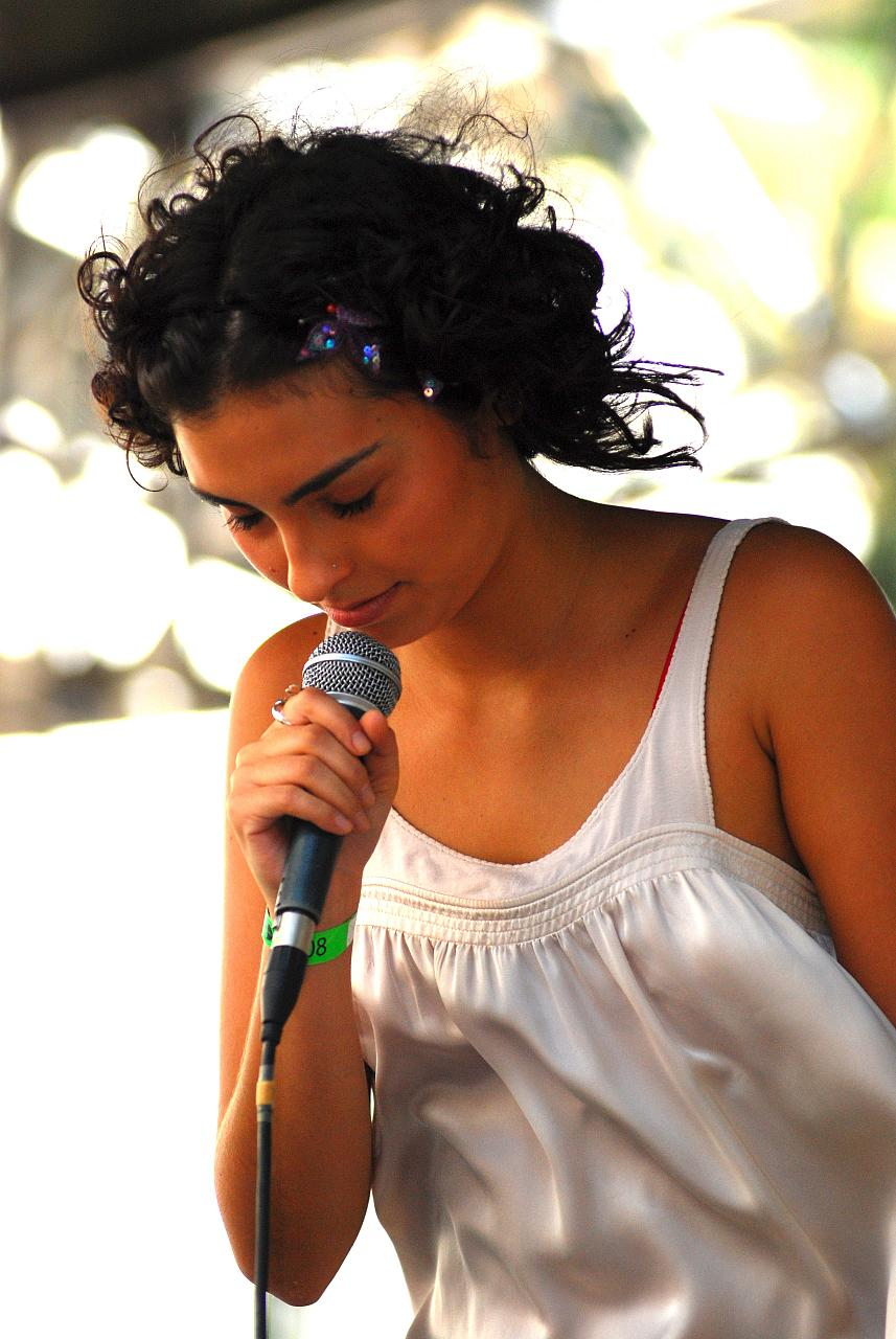 Foto: Silvio Tanaka